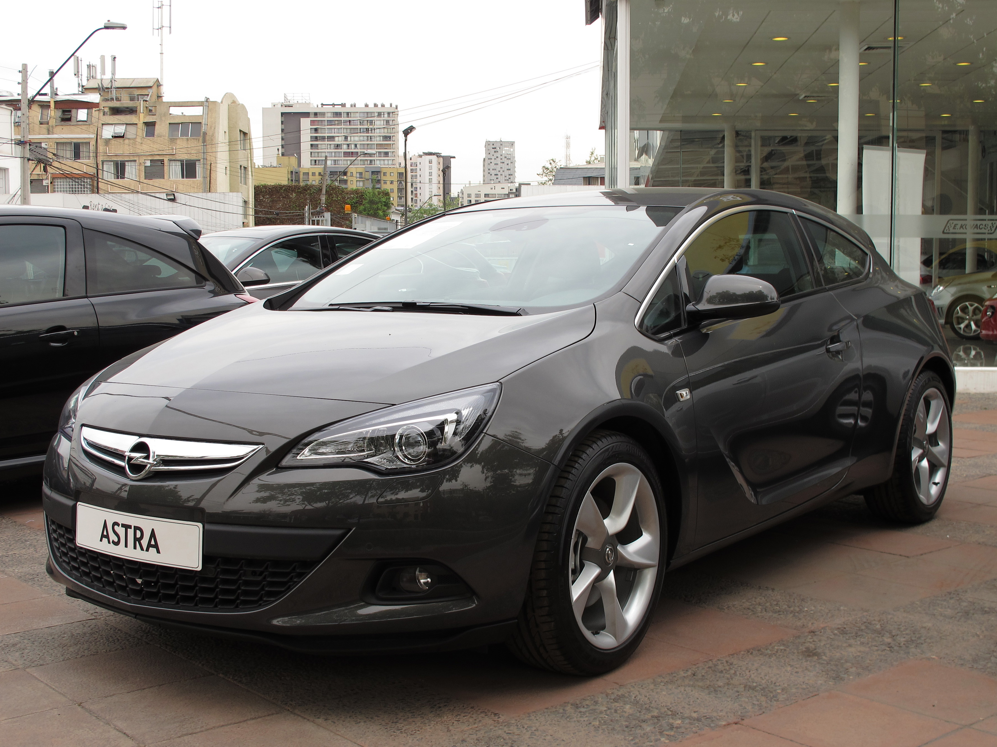 Opel Astra GTC 1.6T Sport 2015